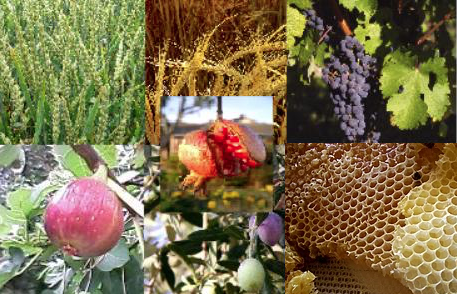 Seven products